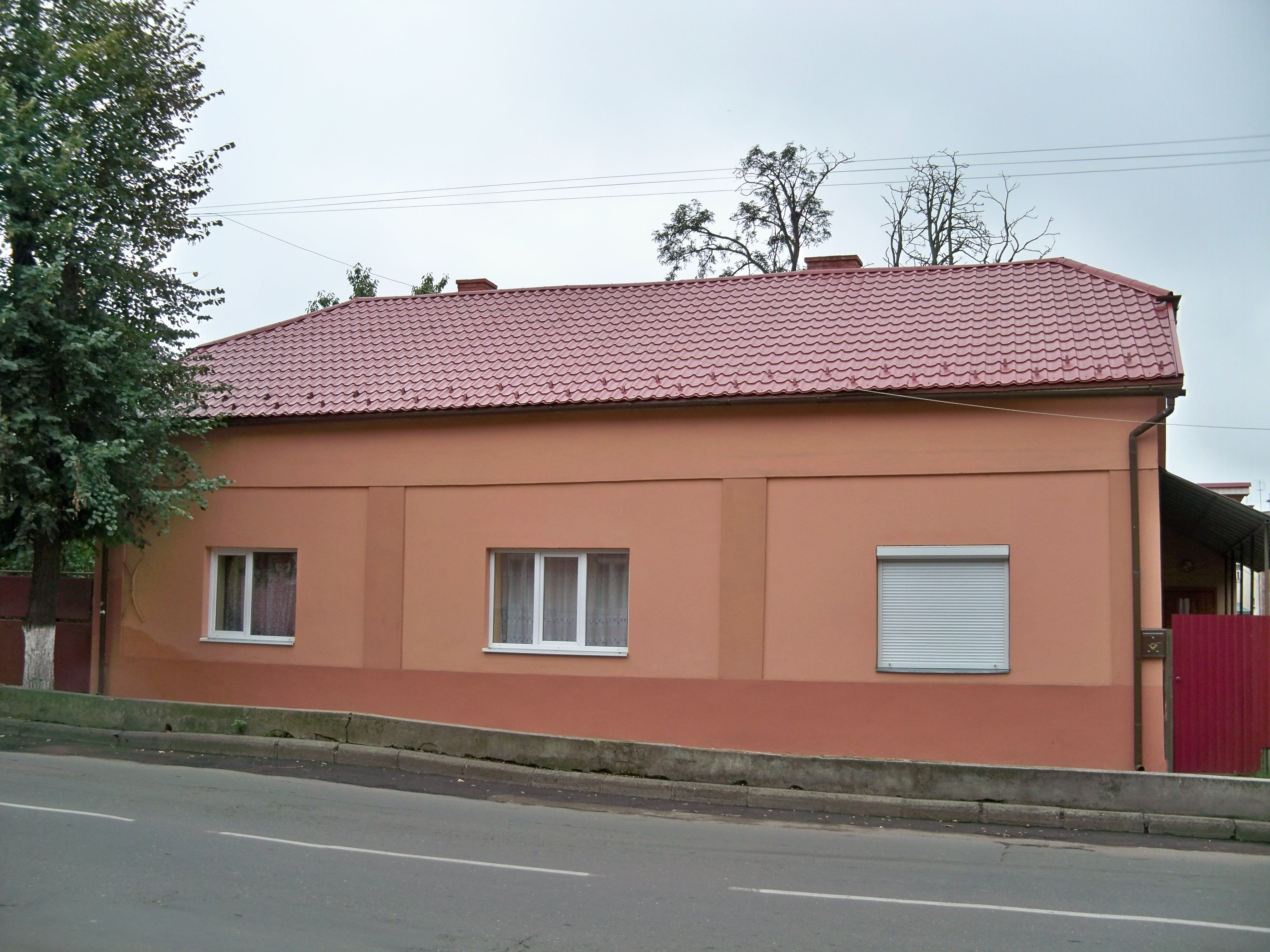 Будинок, в якому жив і працював І. Мондок – відомий діяч комуністичного руху на Закарпатті, Ужгород, вул. Собранецька, 37